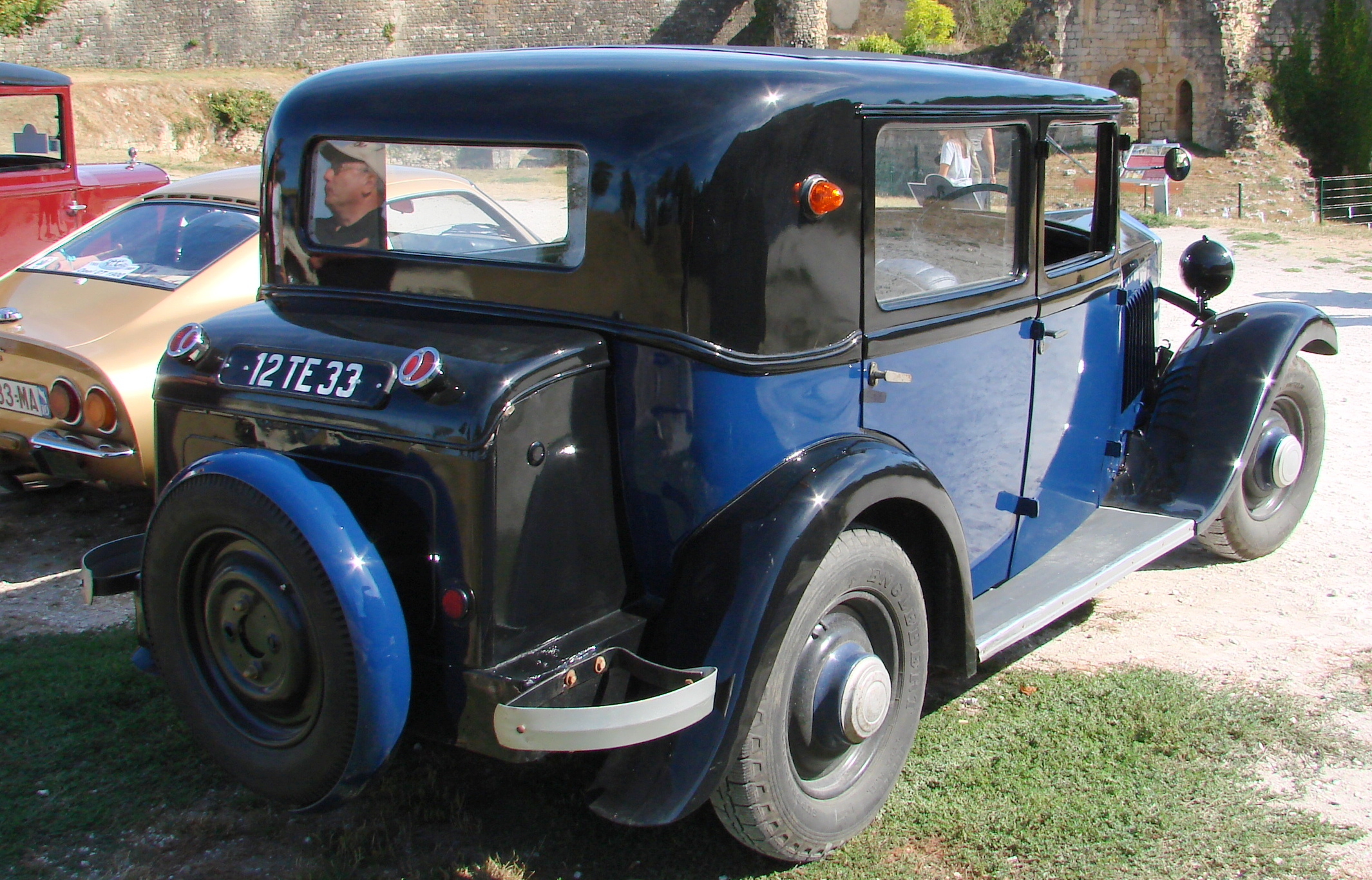 Mathys Emy 4 S de 1933 (journées du patrimoine 2012 Blaye)